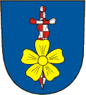 znak obce